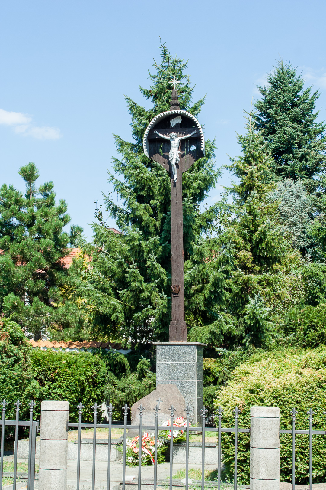 Drewniany krzyż poświęcony ofiarom powstania listopadowego i pamiątkowy głaz u jego stóp z wyrytym napisem, postawione tuż po odzyskaniu przez Polskę niepodległości w 1919 r. Warszawa Wawer. Napisy: kamień: Ś. + P. POLEGŁYM ZA OJCZYZNĘ W DNIACH 19.GO LUTEGO I.31.MARCA 1831.R. płyta poniżej: A JEŚLI KOMU DROGA OTWARTA DO NIEBA TYM CO SŁUŻĄ OJCZYŹNIE JAN KOCHANOWSKI W MOGILE TEJ SPOCZYWAJĄ PROCHY ŻOŁNIERZY POWSTANIA LISTOPADOWEGO POLEGŁYCH W ZWYCIĘSKICH BITWACH 19 LUTEGO I 31 MARCA 1831 R. W 170 ROCZNICĘ ZWYCIĘSTWA POD WAWREM 31 MARCA 2001 R. MIESZKAŃCY GMINY WARSZAWA WAWER Lokalizacja: M-y ul.Płowiecka 83 (Austerią Wawerską, Karczmą Wawerską,tuż przy murze) a ul. Płowiecka 85.